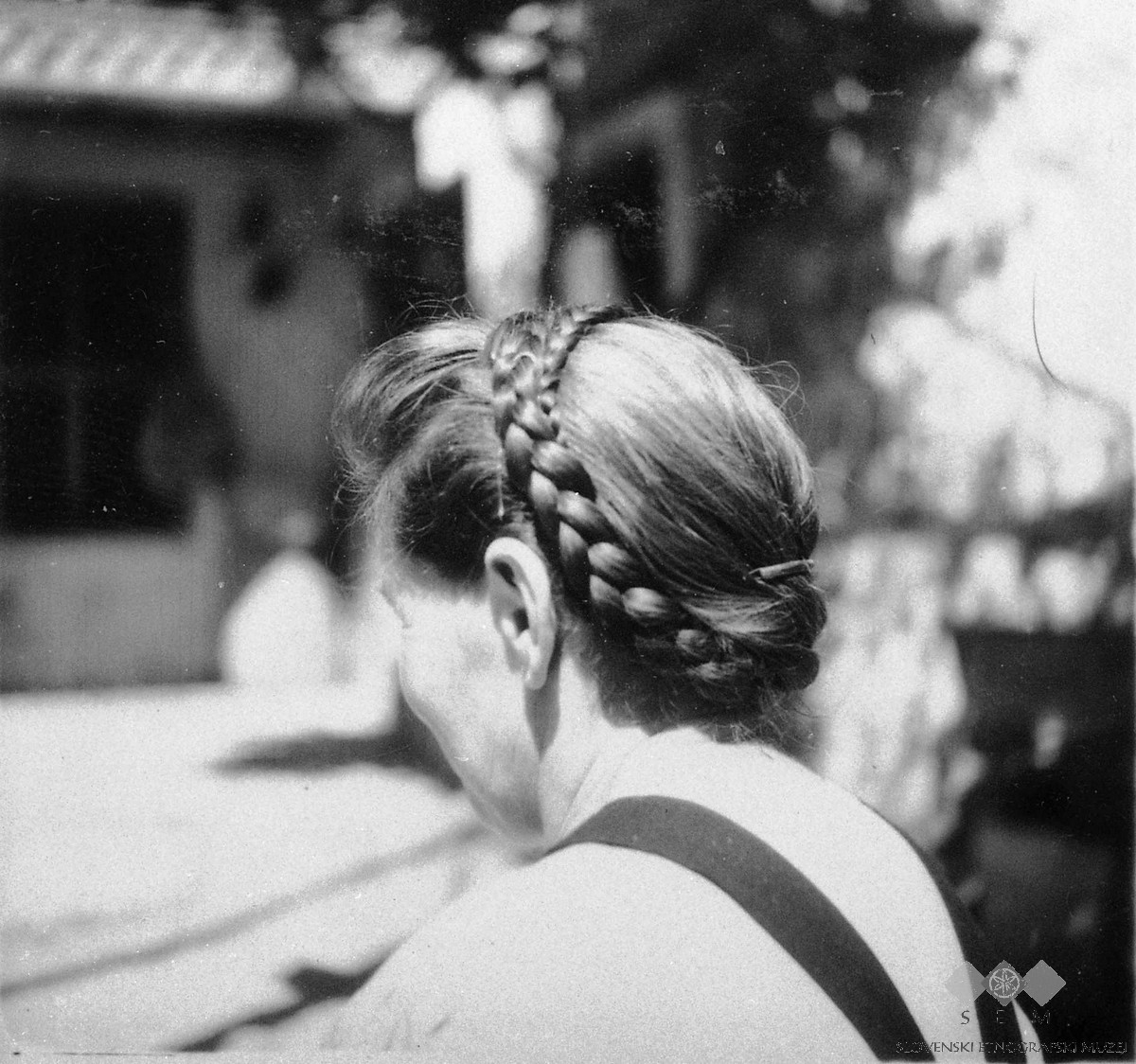 Pričeska - frizura, Marija Vovk, Goče.